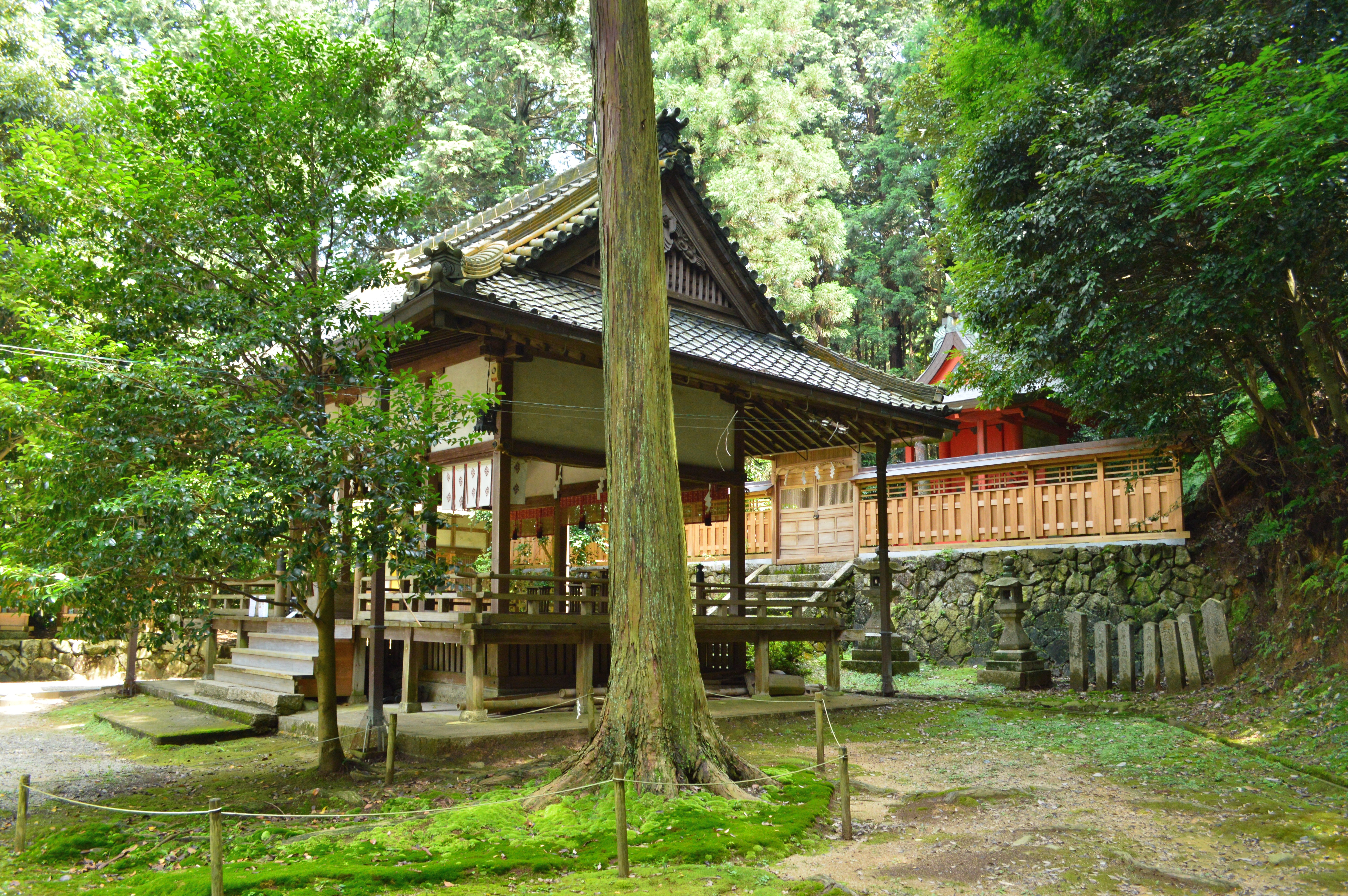 葛木御歳神社 本殿と拝殿